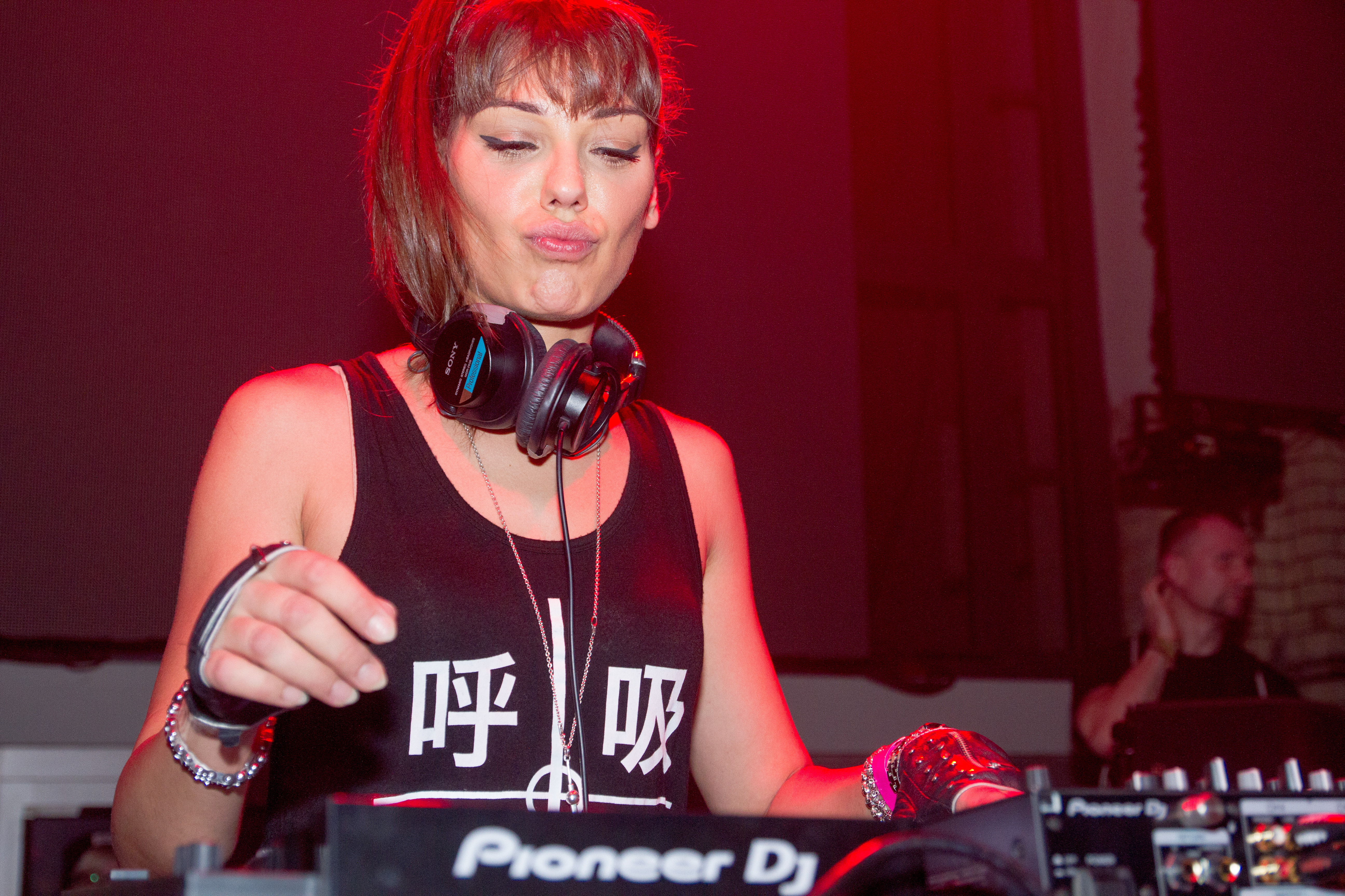 Ana Simina Grigoriu beim Steine und Bass Festival im Berliner E-Werk.